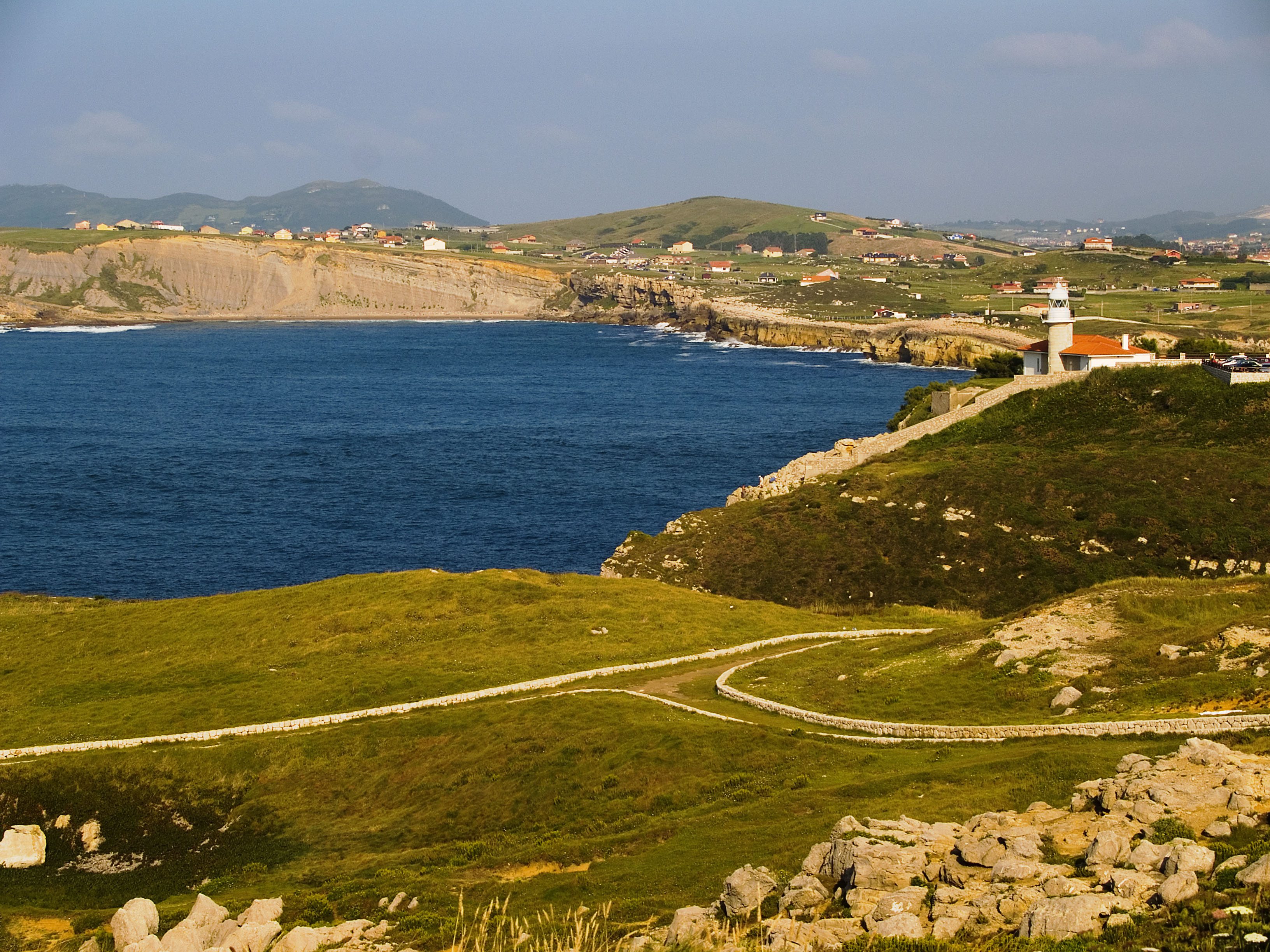 Faro de Punta Torco de Afuera, en Suances (Cantabria, España)